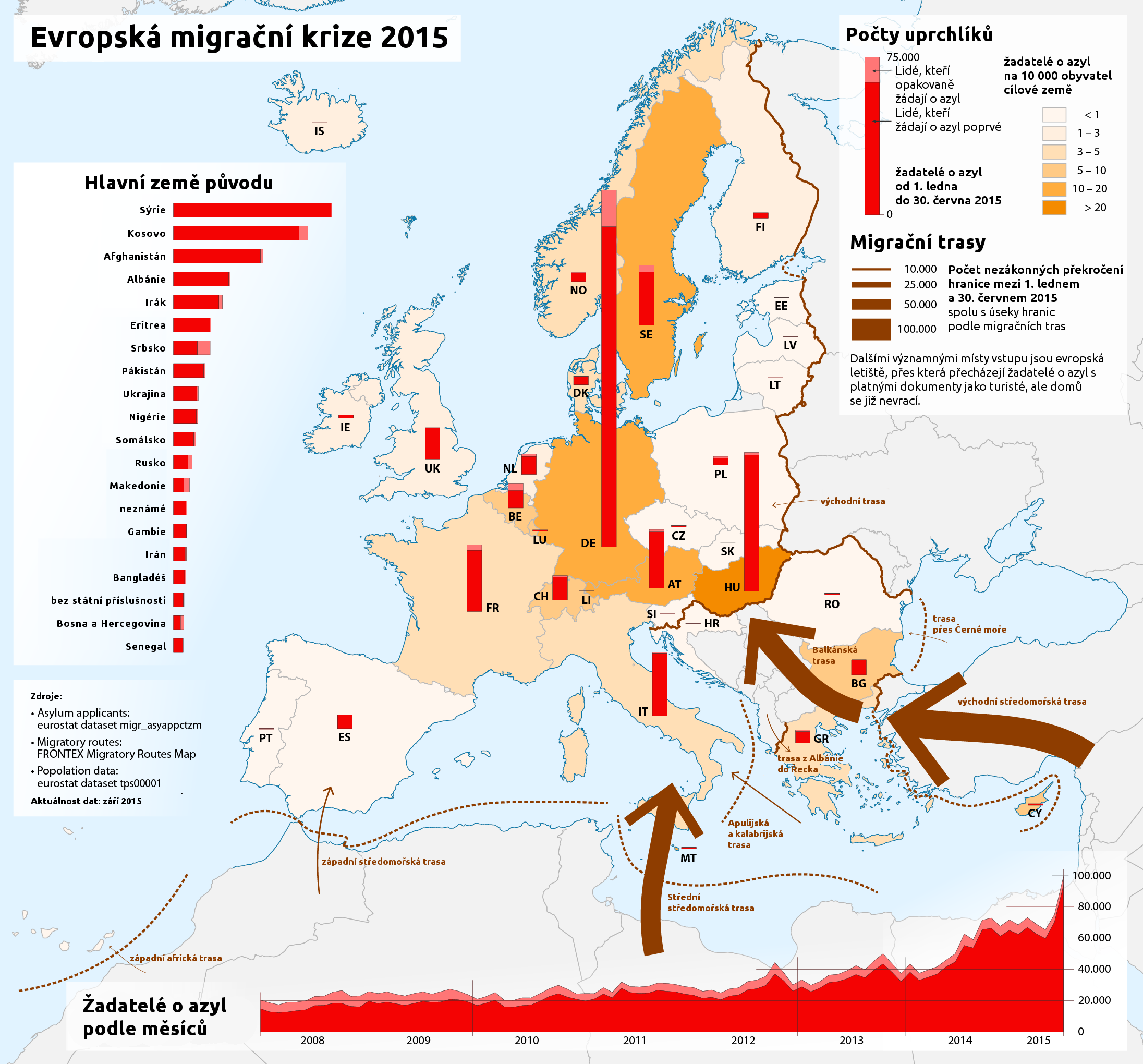 Trasy a počty migrantů během evropské migrační krize v první polovině roku 2015.